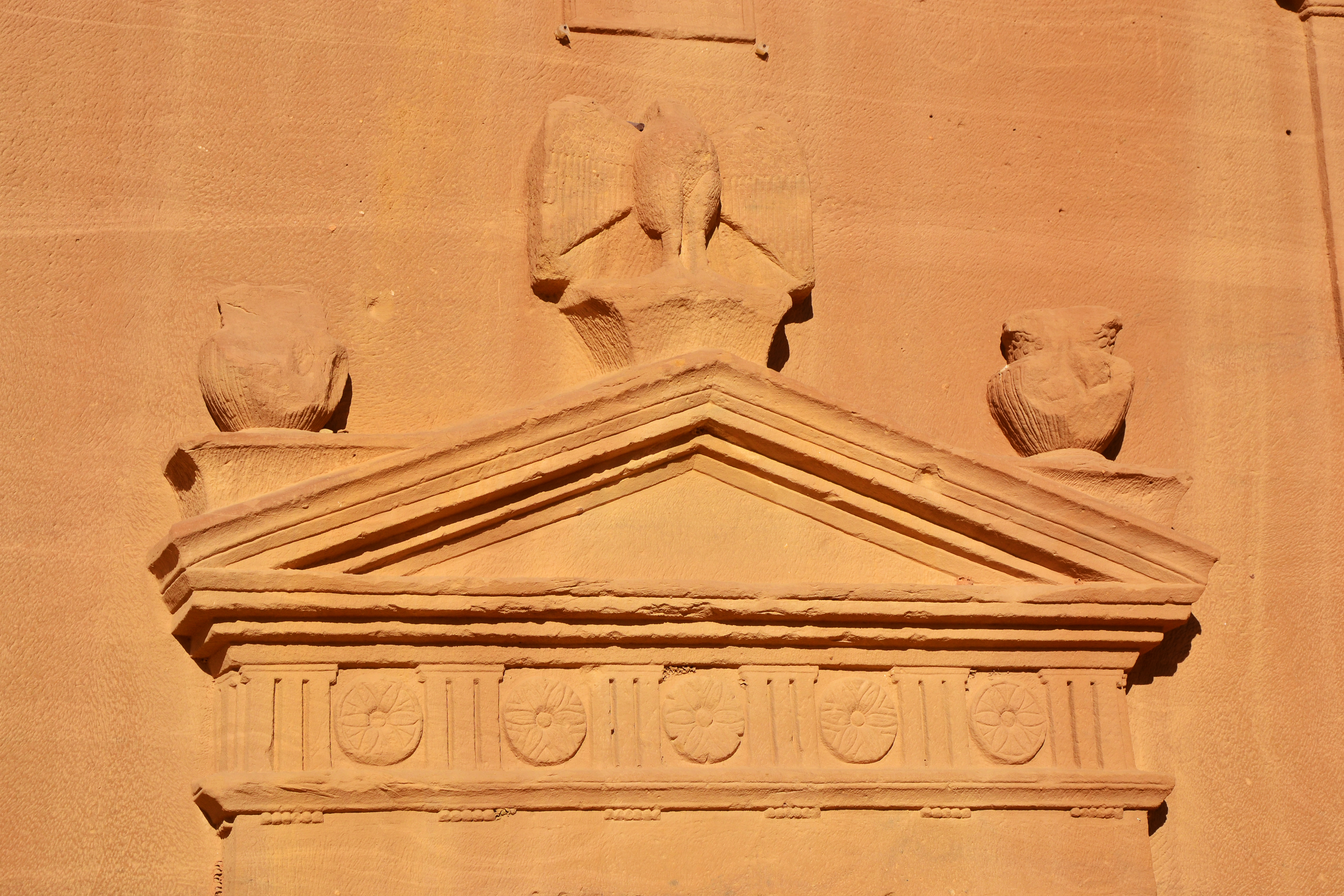 Madain Saleh نقوش وعوارض تكون أعلى المدخل وأسفل الشرفات